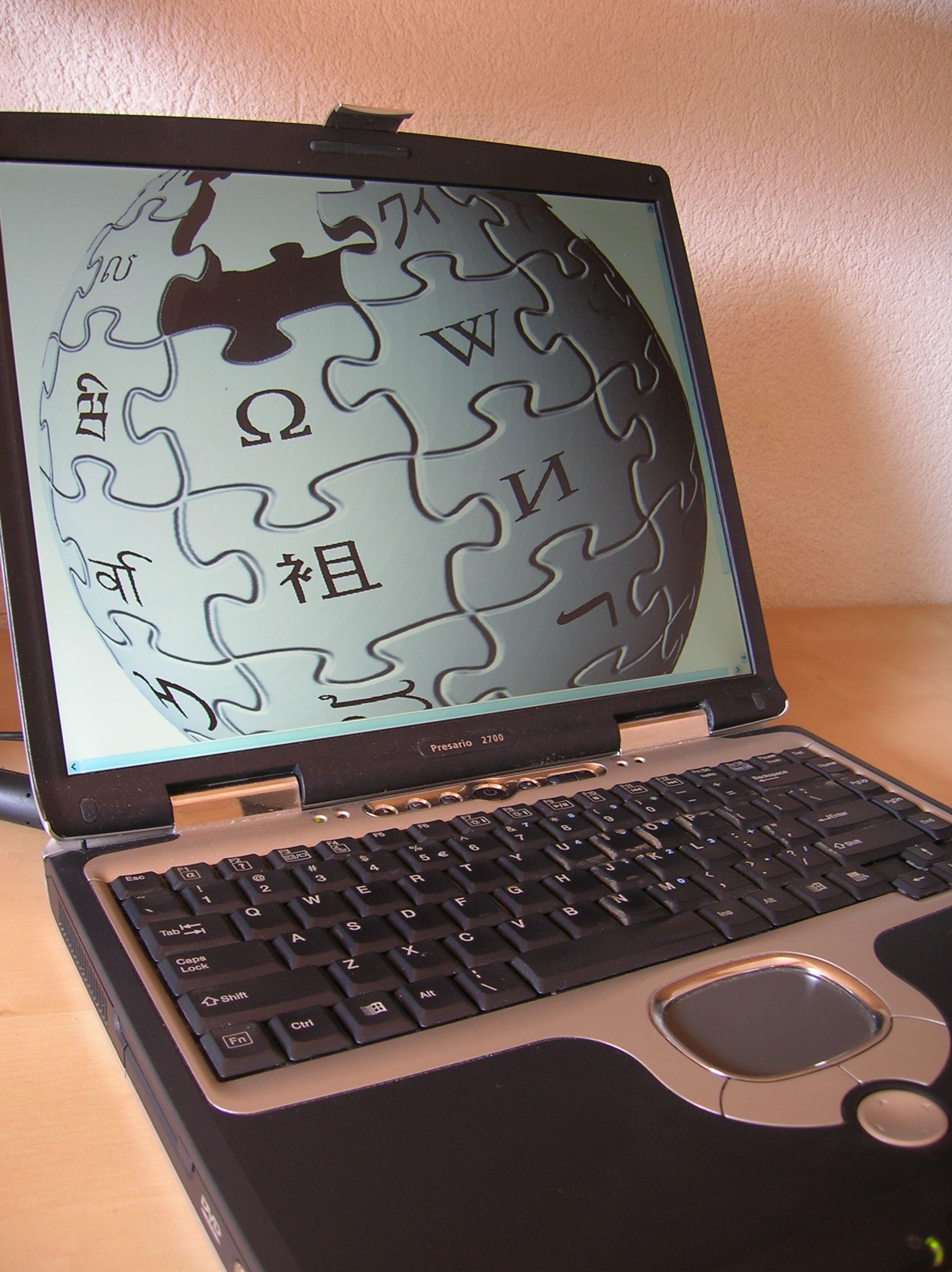 Compaq Presario 2700EA-laptop die het Wikipedialogo weergeeft.